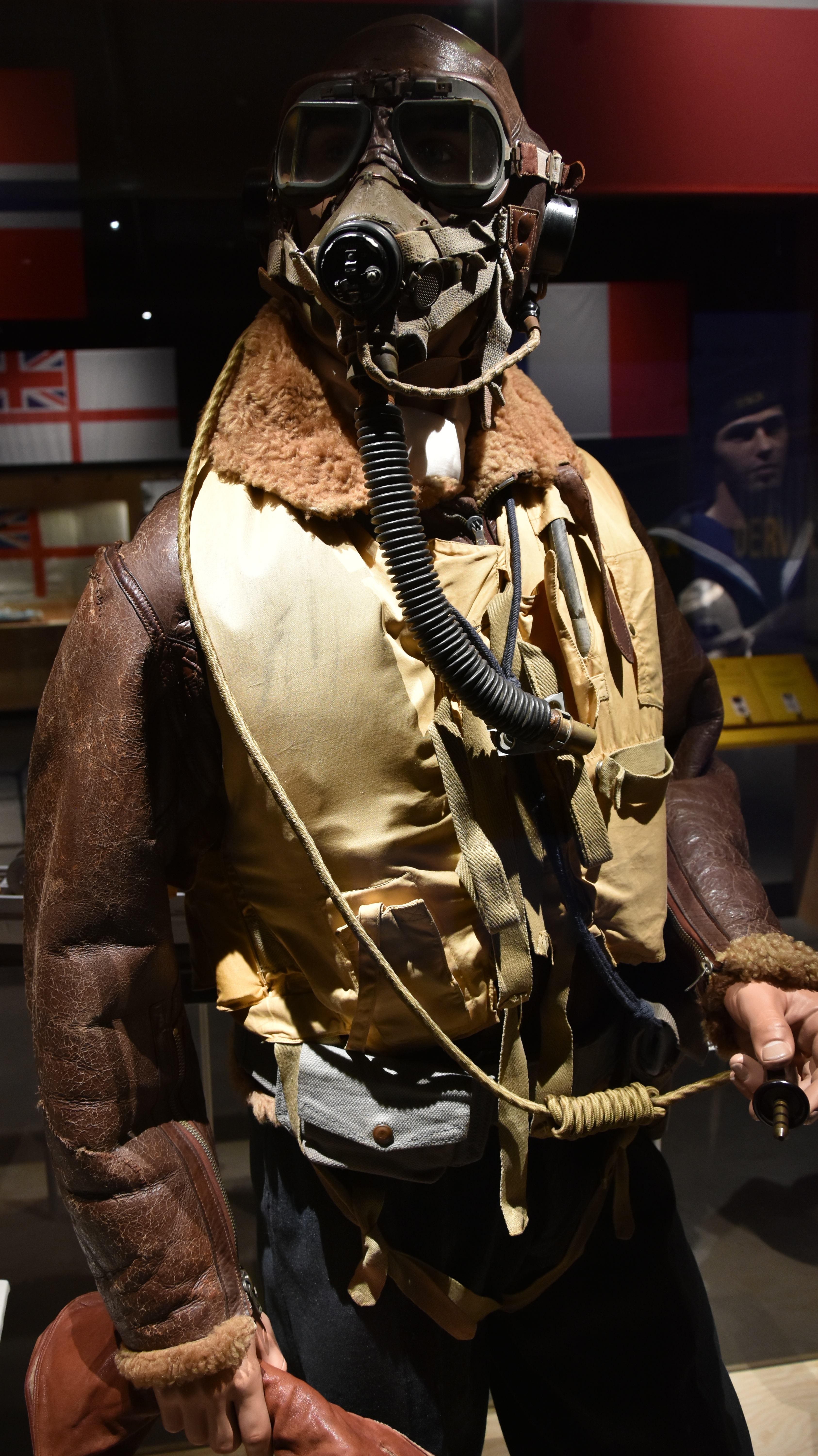 Typhoon-piloot van 609 Squadron Seafront (Zeebrugge) 25-06-2019